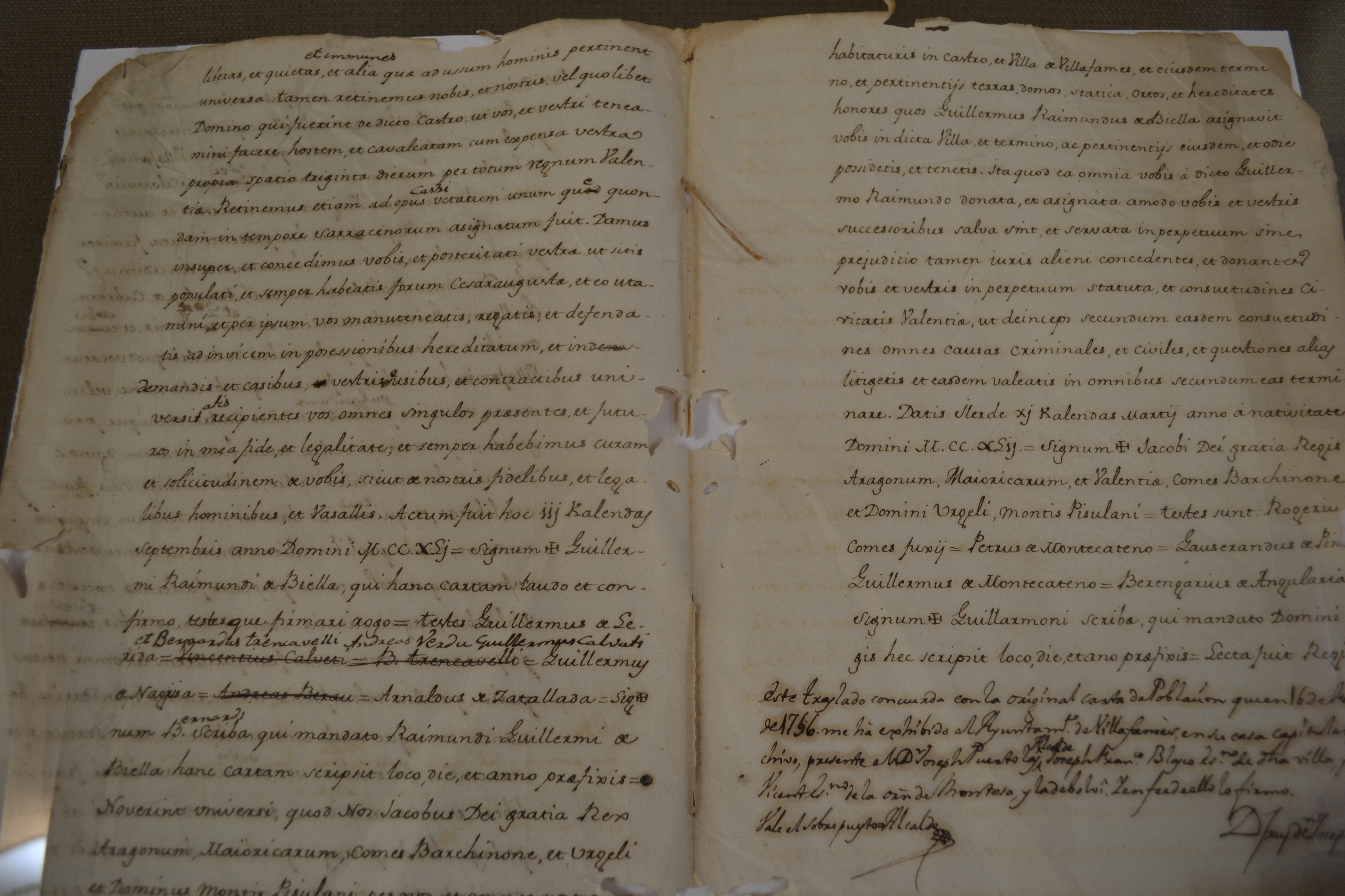 Guillem Ramon de Viella, en nom de Jaume I, concedeix carta pobla al castell de Vilafamés en les persones de Domingo Ballester de Mora, Arnau de Cabrera, Guillem Guitart, Martí de Loça i Guillem Gomis a fur de Saragossa (31 d'agost de 1241). ARV: Clero, caixa 2329 (còpia de 12 de febrer de 1756). Arxiu del Regne de València.